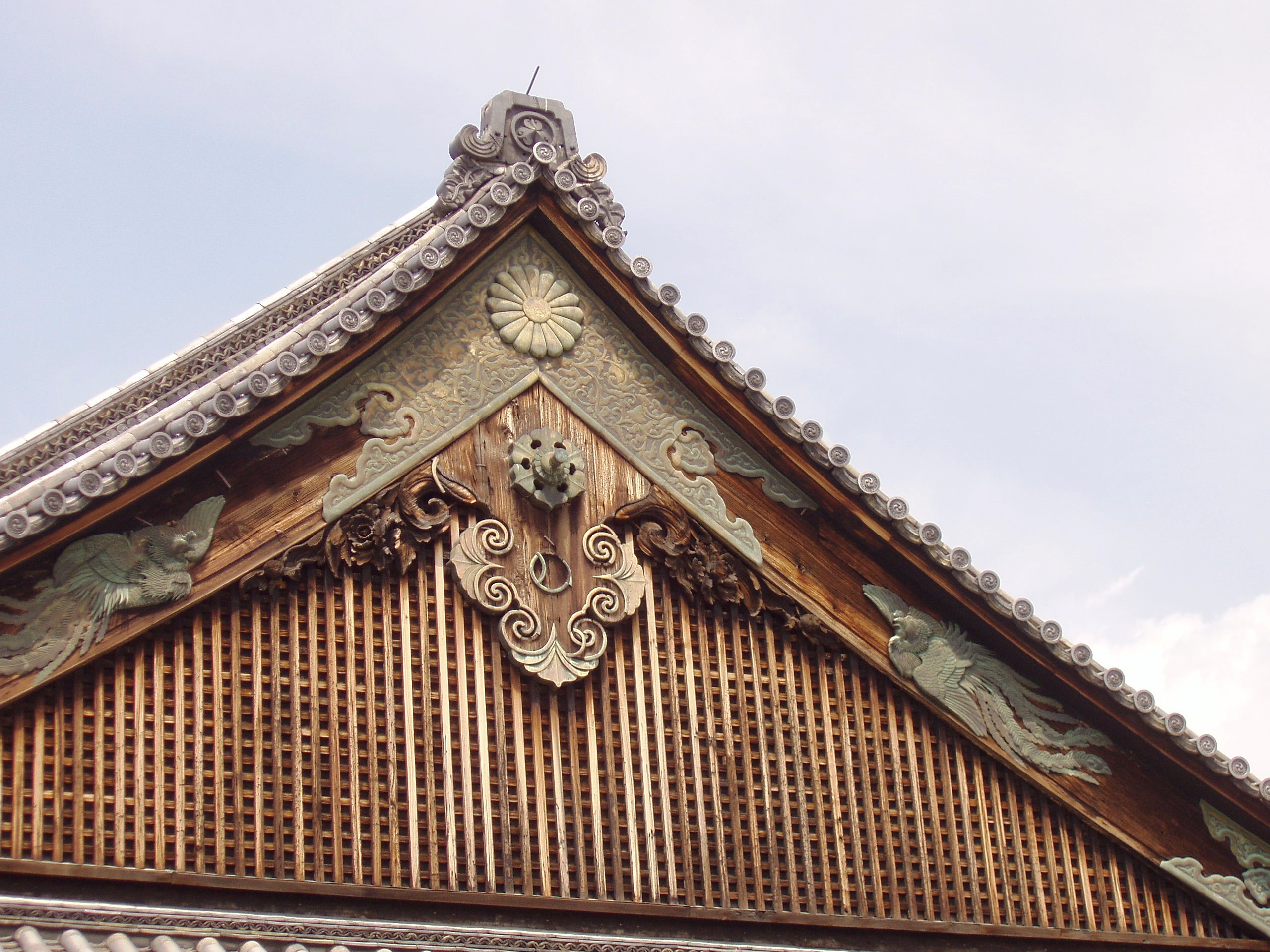 Ninomaru Palace, Nijo Castle, Kyoto, Japan. Facade detail.